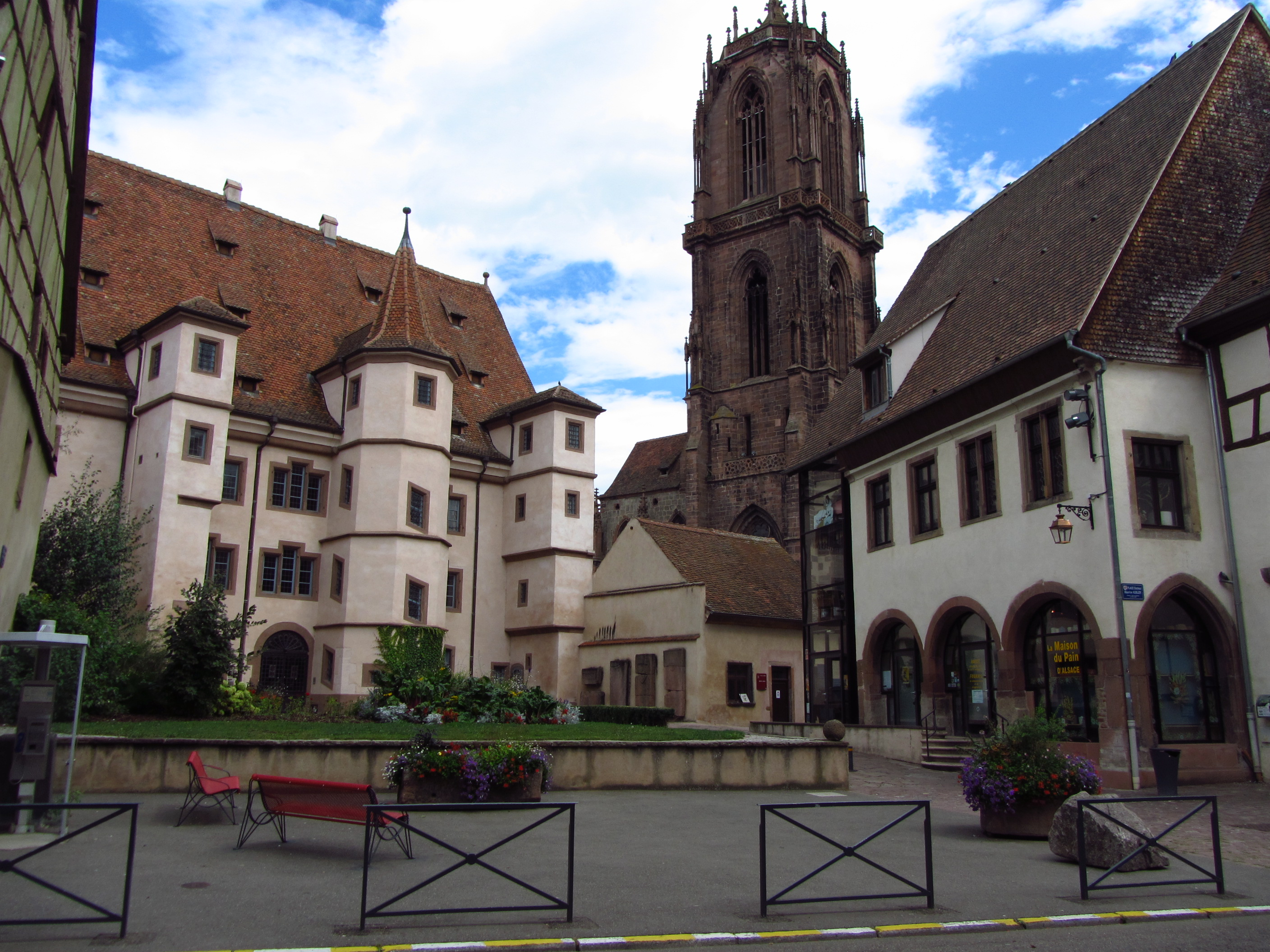 Sélestat : le cœur du centre-ville